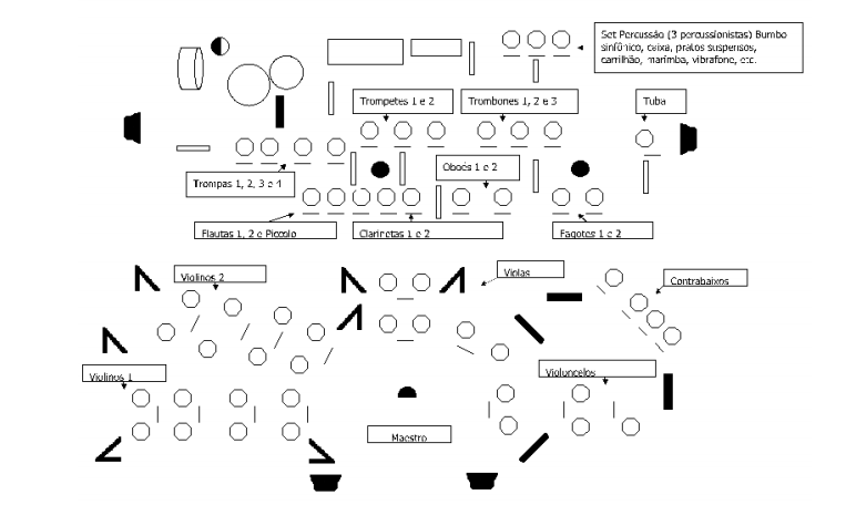 Português do Brasil: Disposição da Orquestra Filarmônica do SENAI de São Paulo.